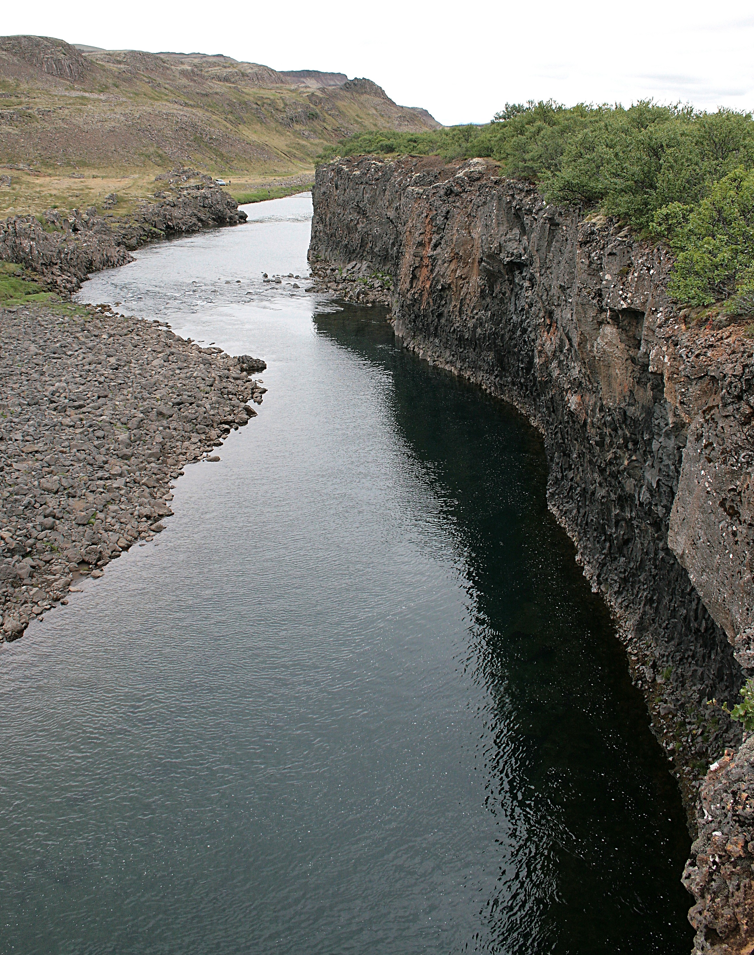 Vesturland: Lachsfluß Norðurá_(Mýrar) (isländisch: Norðurá).